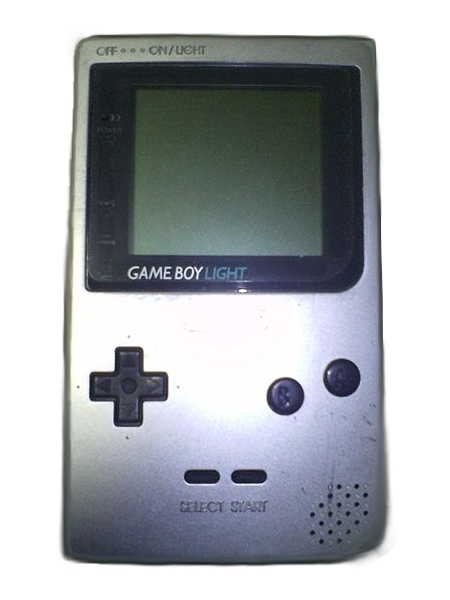 Sámegiella: Game Boy Light